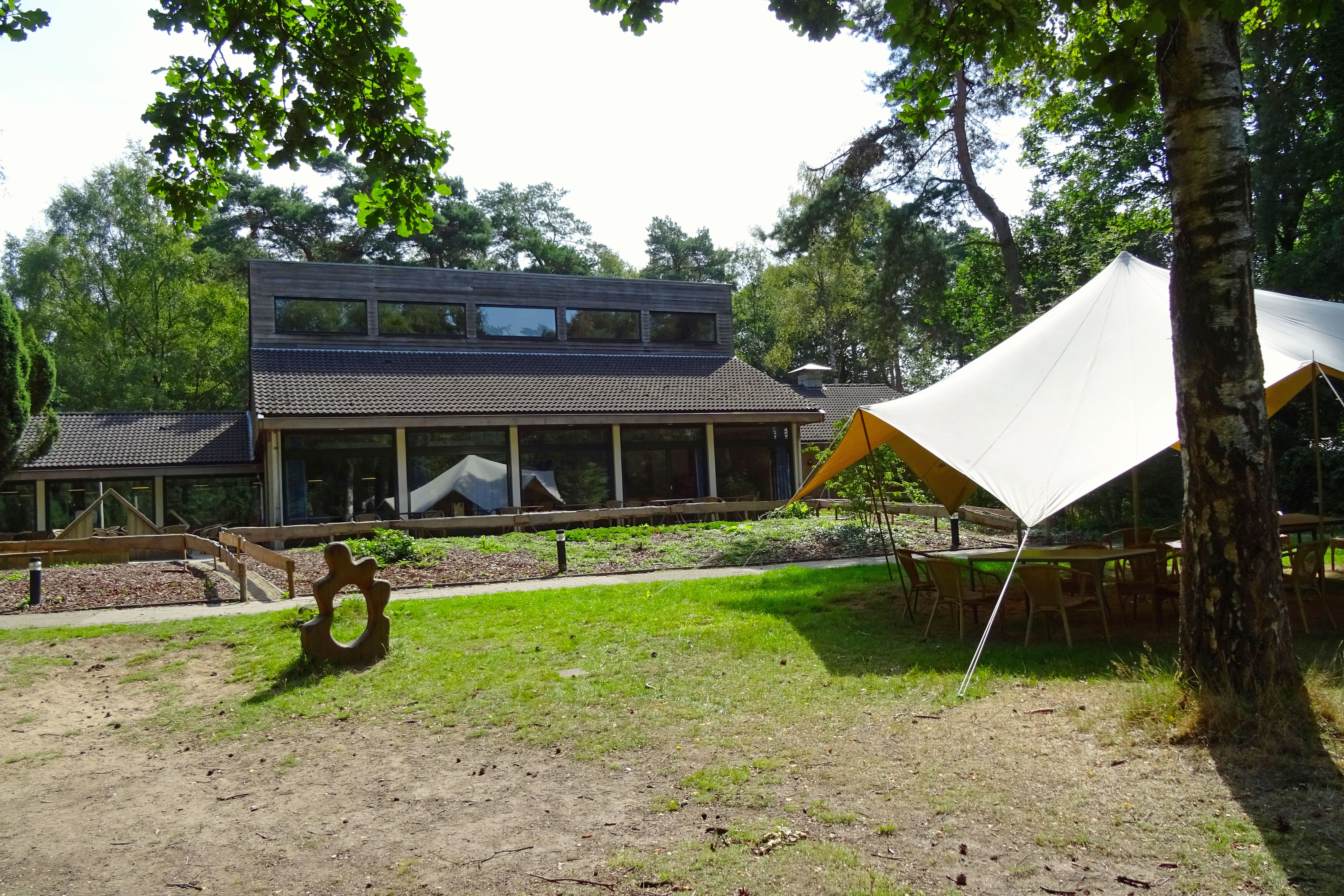 Het Nivonhuis "De Bosbeek" nabij Bennekom